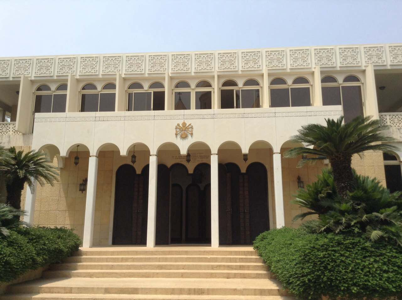 Մեծի Տանն Կիլիկիո կաթողիկոսության վեհարանն Անթիլիասում